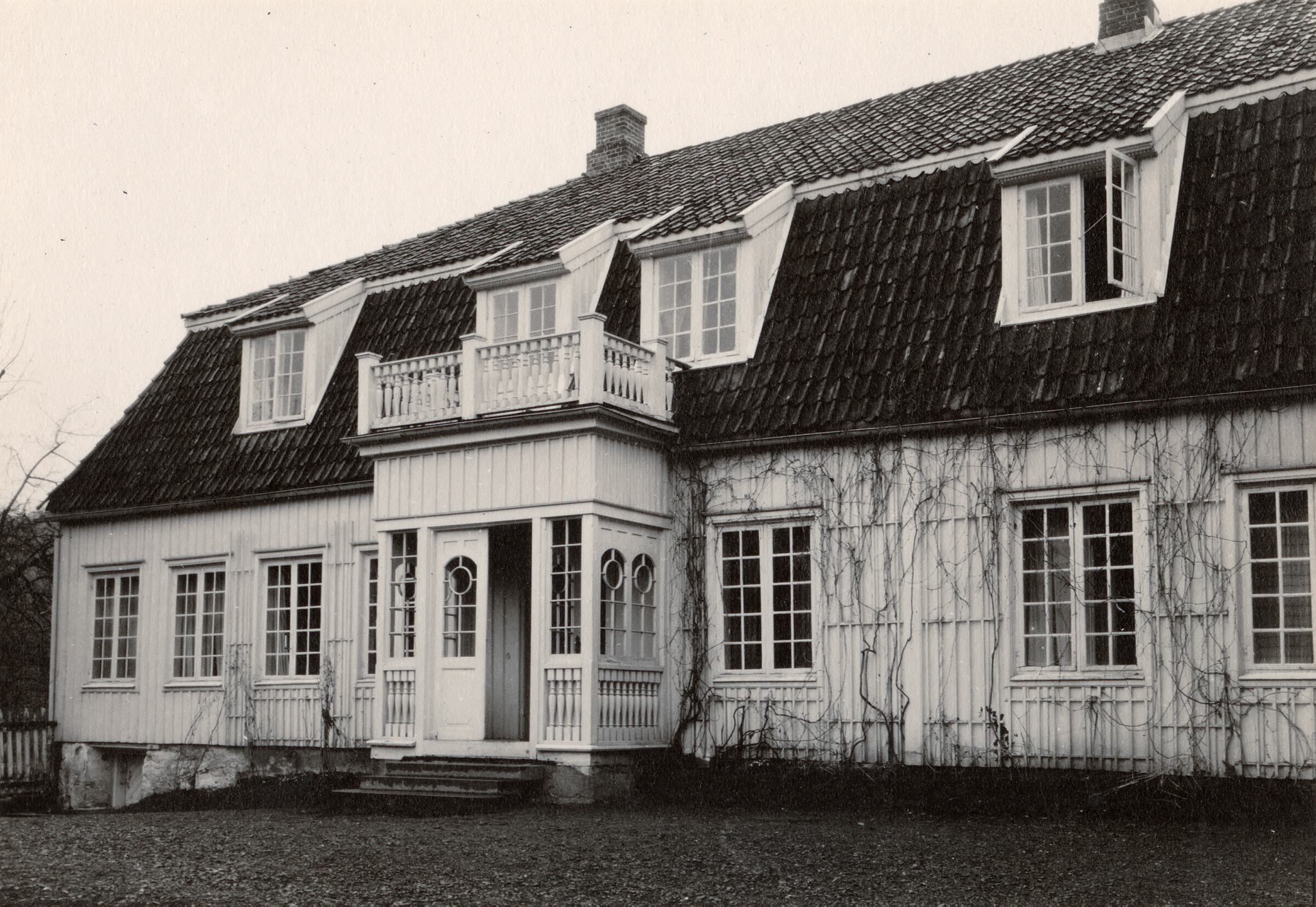 Falkensten, Borre. This image on crowdsourcing geotagging platform Fotodugnad